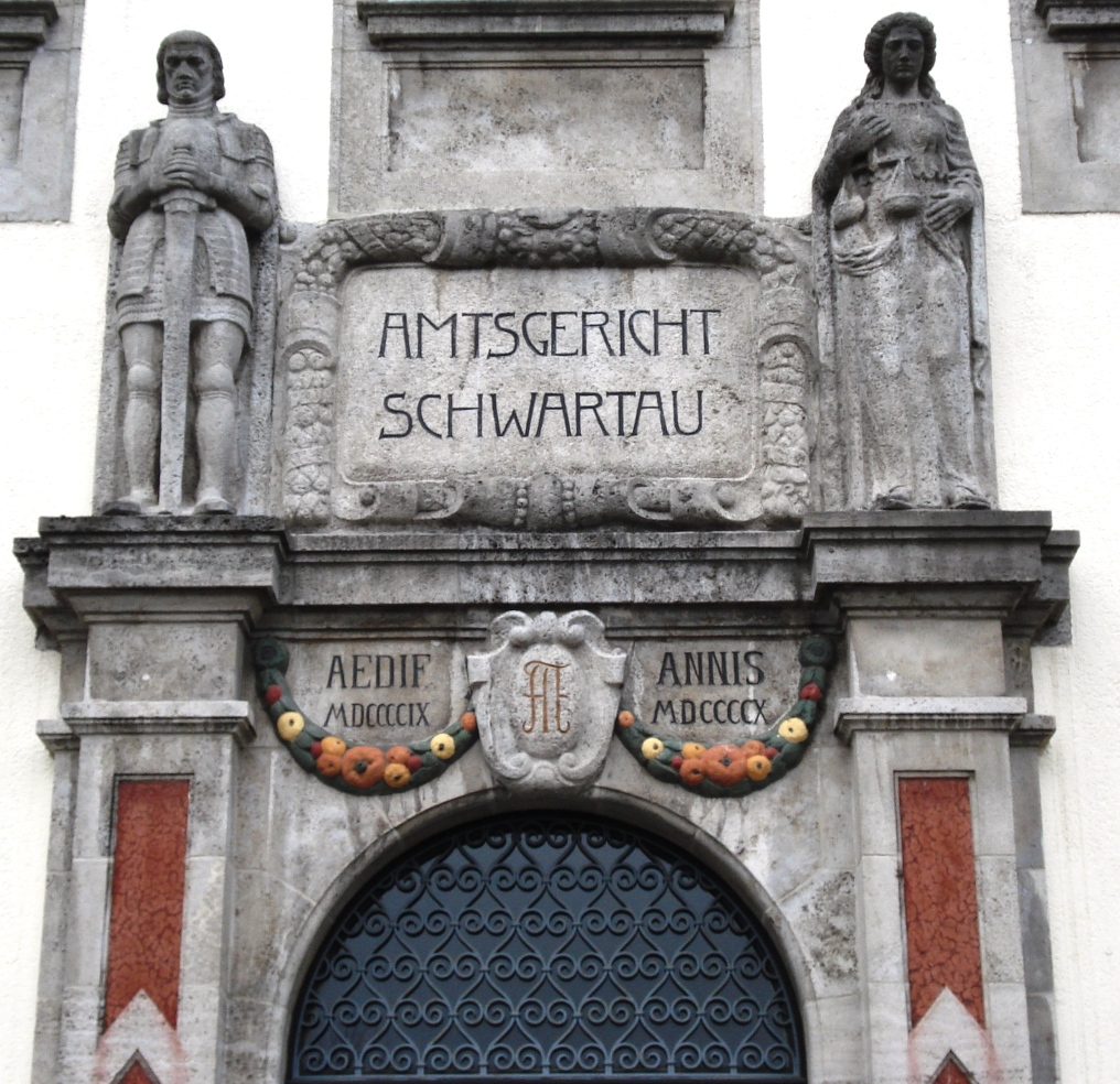 Detail am Amtsgericht in Bad Schwartau - Portal